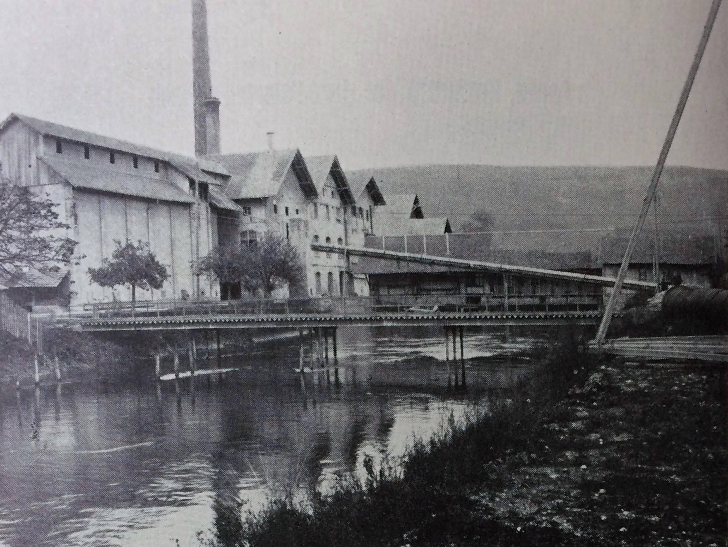 Kraftwerk Rüchlig - Oberwasserseite ca. 1926. Originallegende: Aarau. Zementfabrik. Ansicht der Kraftanlage vom Oberwasser aus